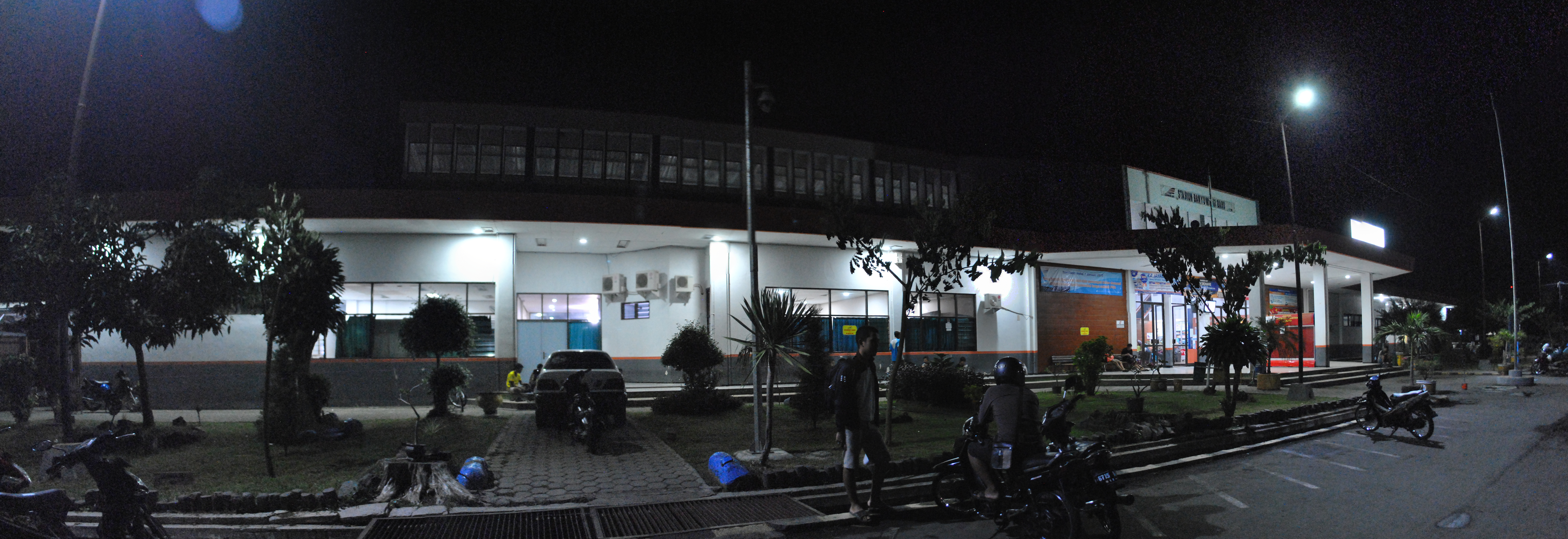 Stasiun Banyuwangi Baru Malam Hari